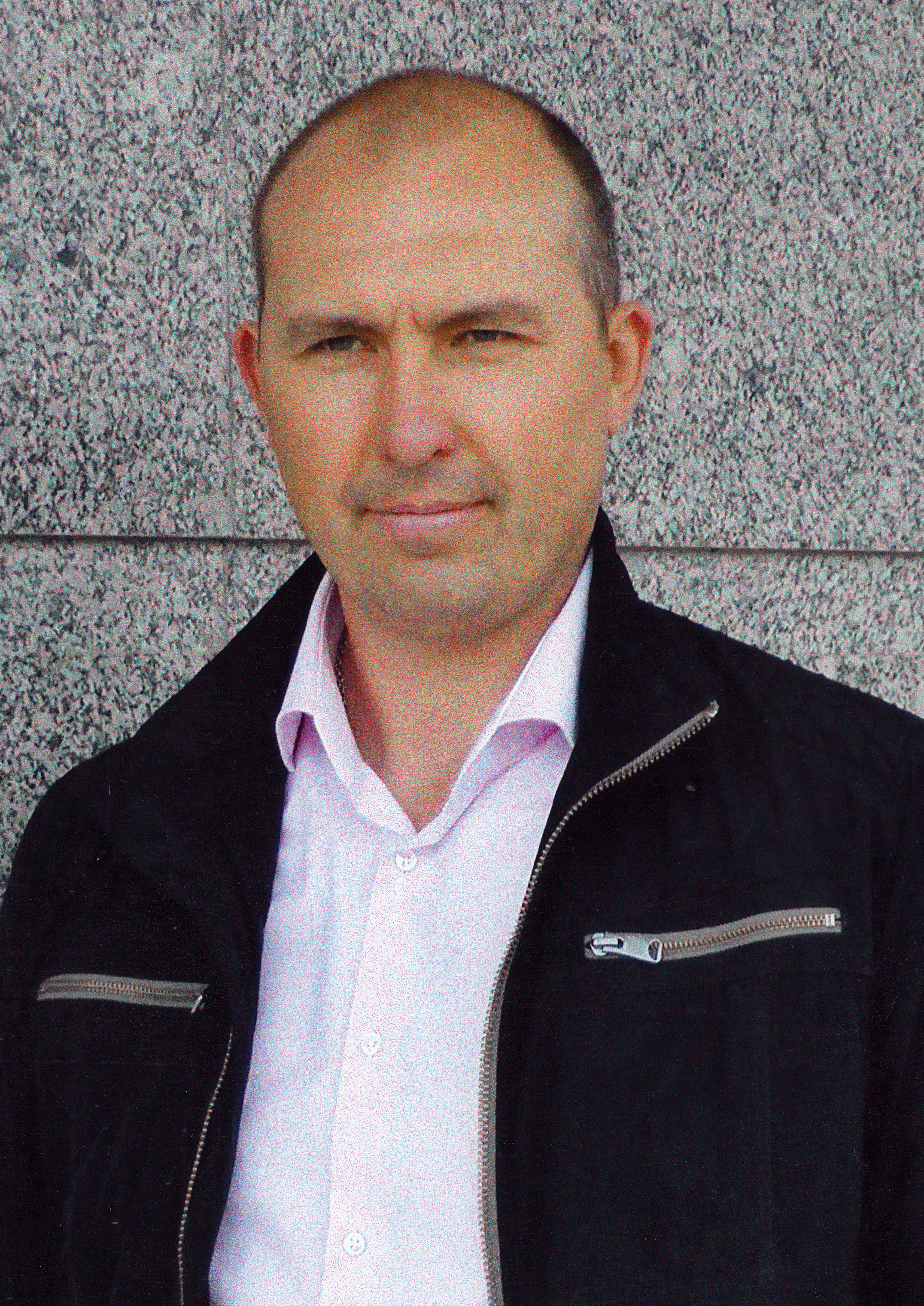 Верлин, Сергей Викторович